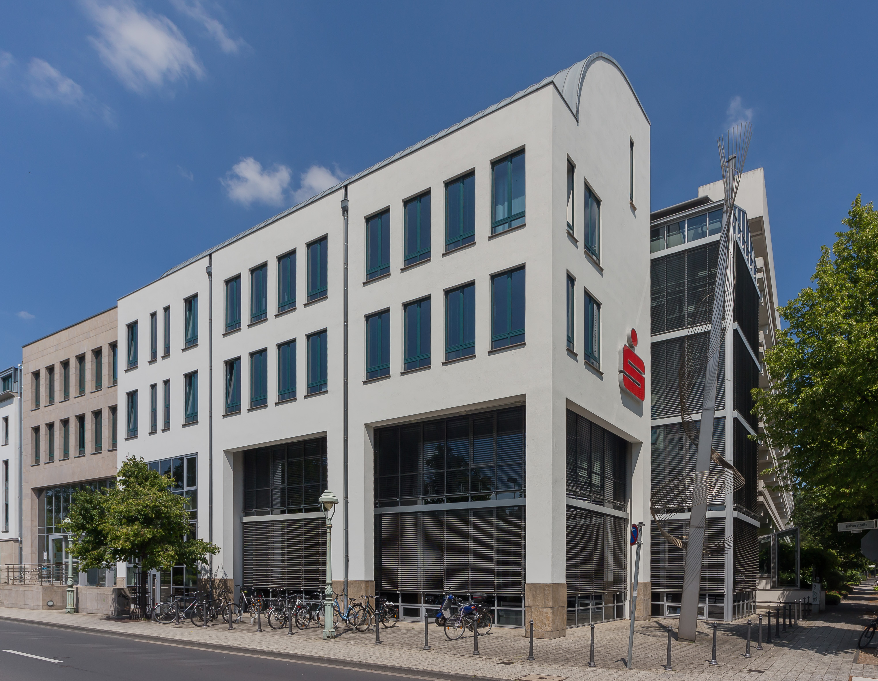 Erweiterungsbau des Gebäudes des Deutschen Sparkassen- und Giroverbands in Bonn-Gronau, Kaiserstraße Ecke Simrockstraße, Architekt: Karl-Heinz Schommer (Fertigstellung 1992)